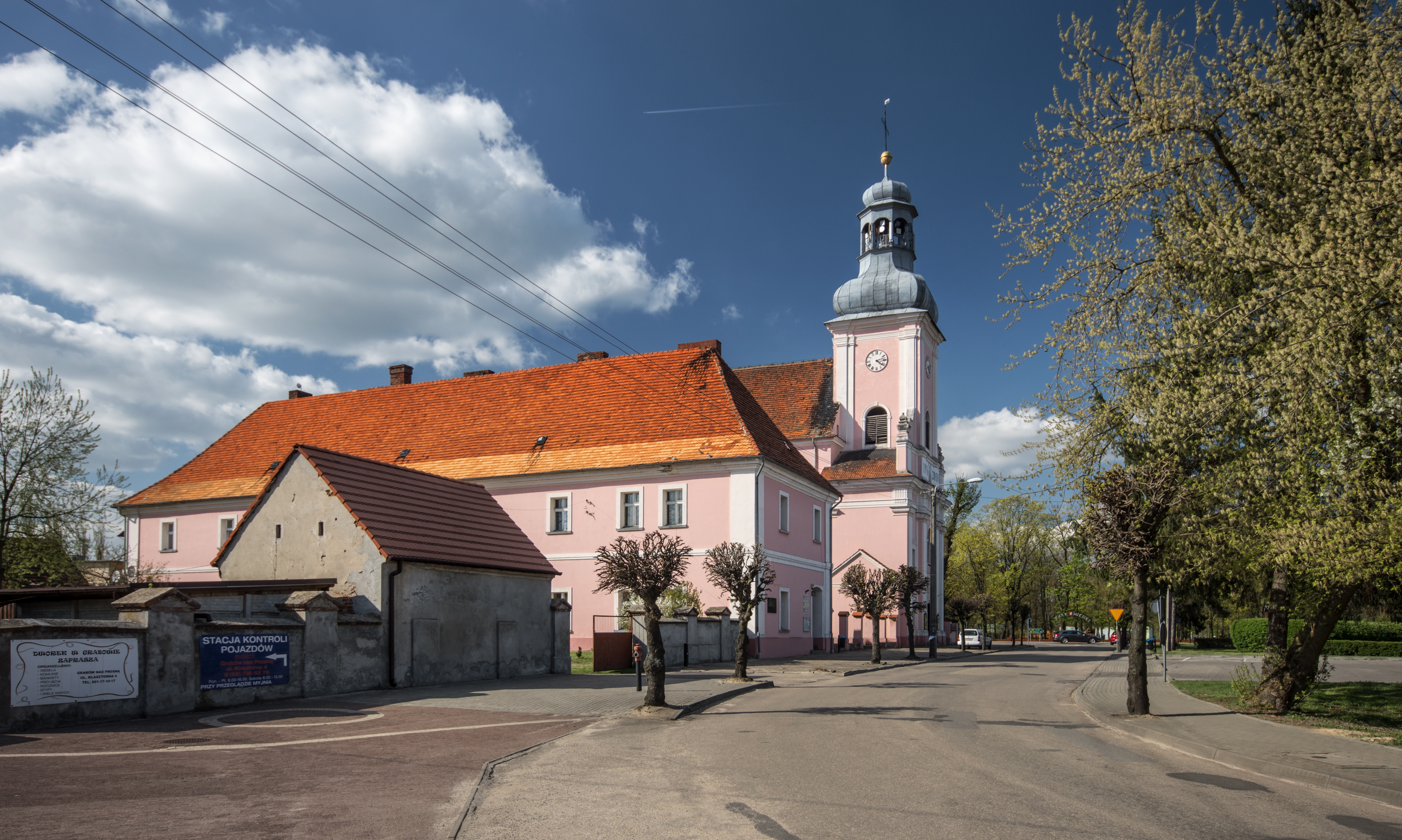 Grabów nad Prosną, kościół, ob. fil. p.w. Niepokalanego Poczęcia NMP, 1642-1658, 1733-1741